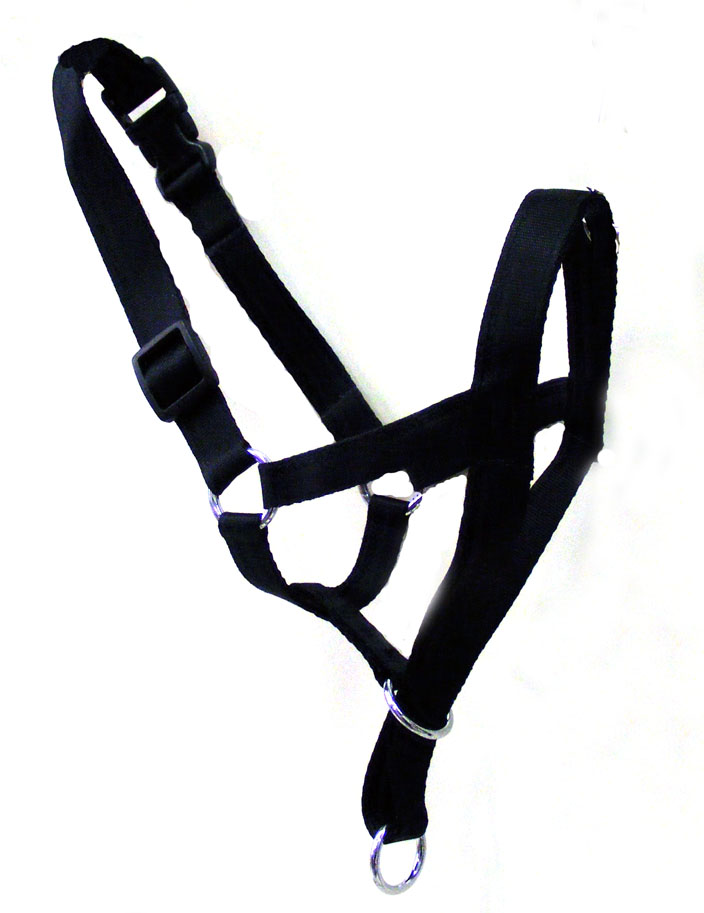 Halti Kopfhalfter, Halfter für Hunde